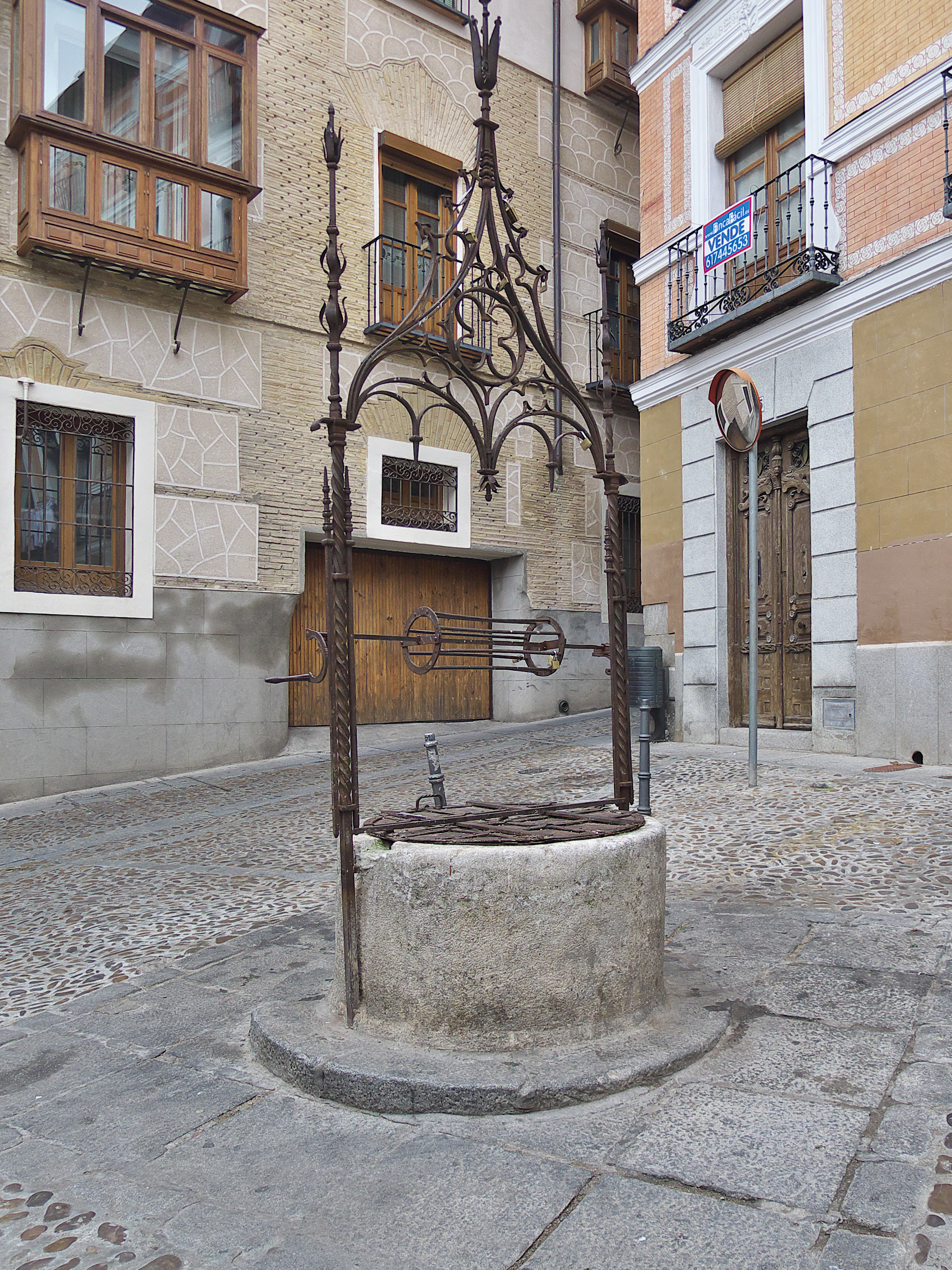 El pozo testigo del amor imposible de una judía.